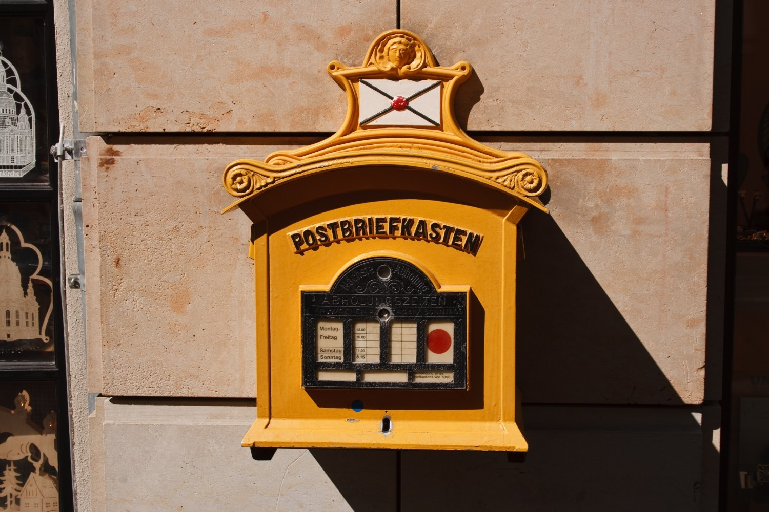 Alter Briefkasten in der Töpferstraße in Dresden